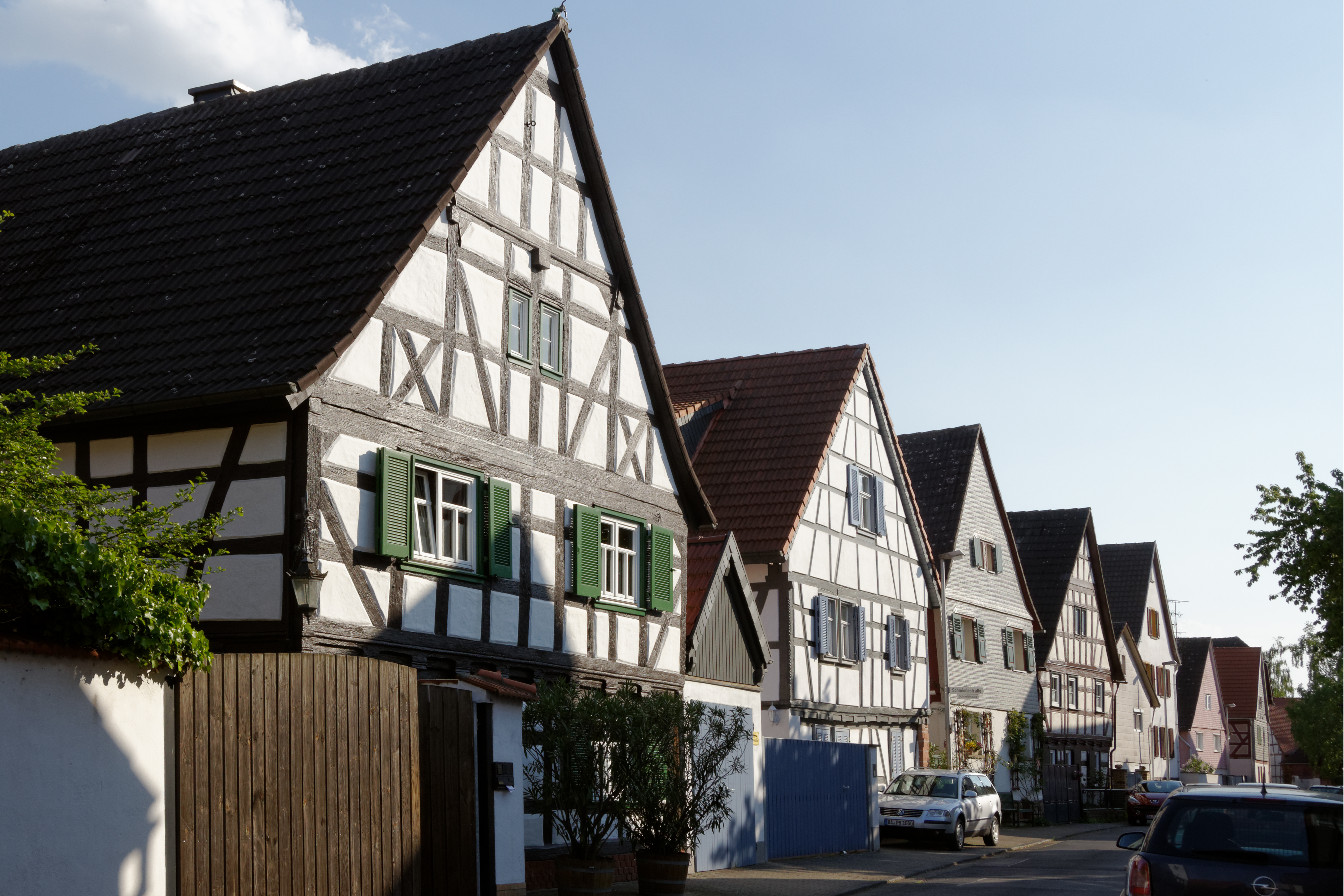 Fachwerkhäuser in Hergershausen, einem Stadtteil von Babenhausen (Hessen). Das Haus Nummer 6 (links) steht unter Denkmalschutz.